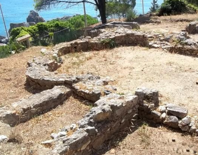 Photo de la Chapelle San Martino construite par Cassiodore au VIe siècle dans la frazione de Copanello Alto (commune de Staletti).